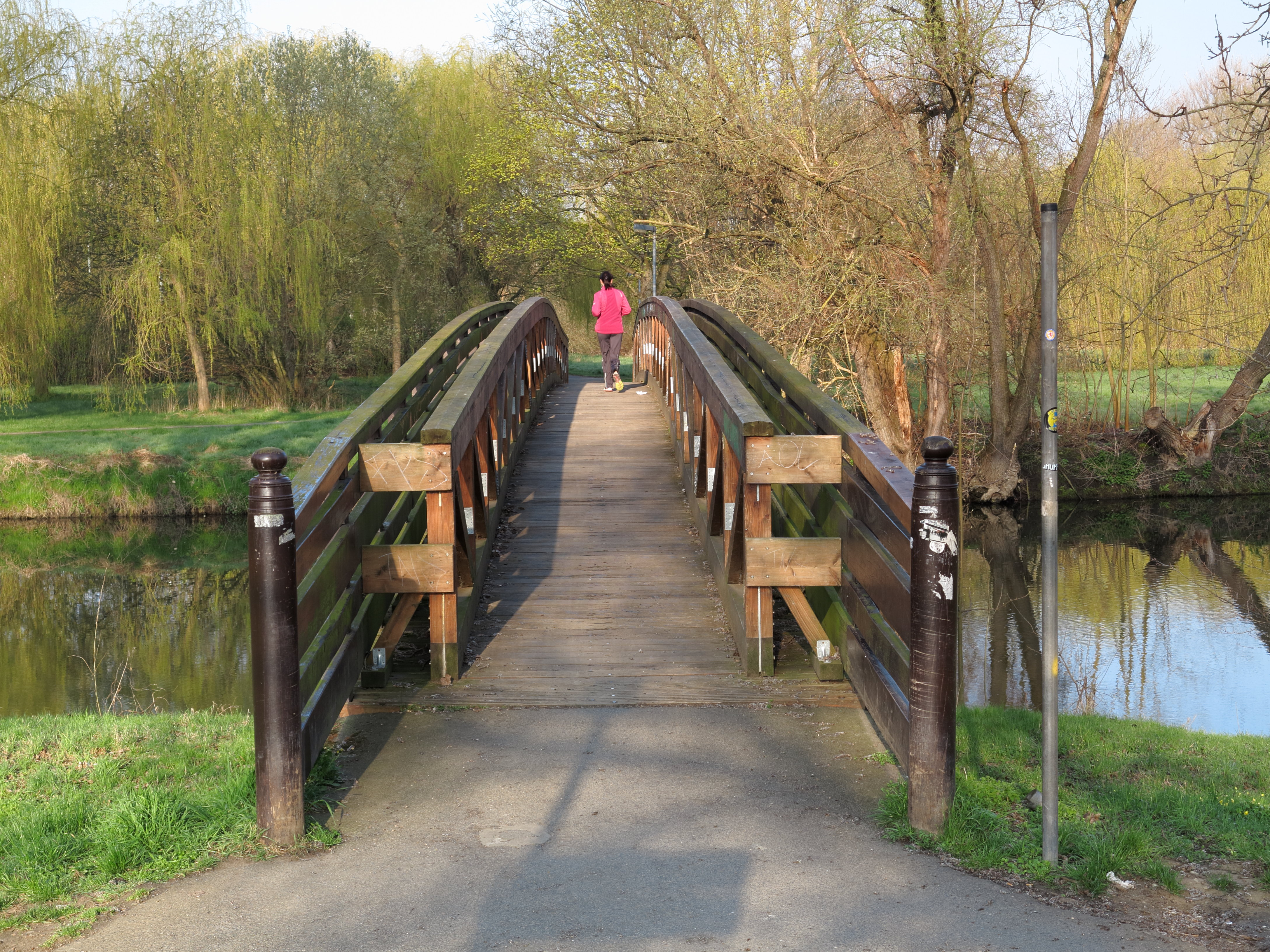 Braunschweig: die Fußgängerbrücke, die auf Höhe Biberweg über die Oker führt und Ölper mit und dem Schwarzen Berg verbindet. Die Holzkonstruktion ist teilweise durch einen Pilz angegriffen. Es wurden deshalb tragende Holzfachwerke aufgebaut. Aus statischen Gründen war zugleich die Reduzierung der Lauffläche auf eineinhalb Meter erforderlich.